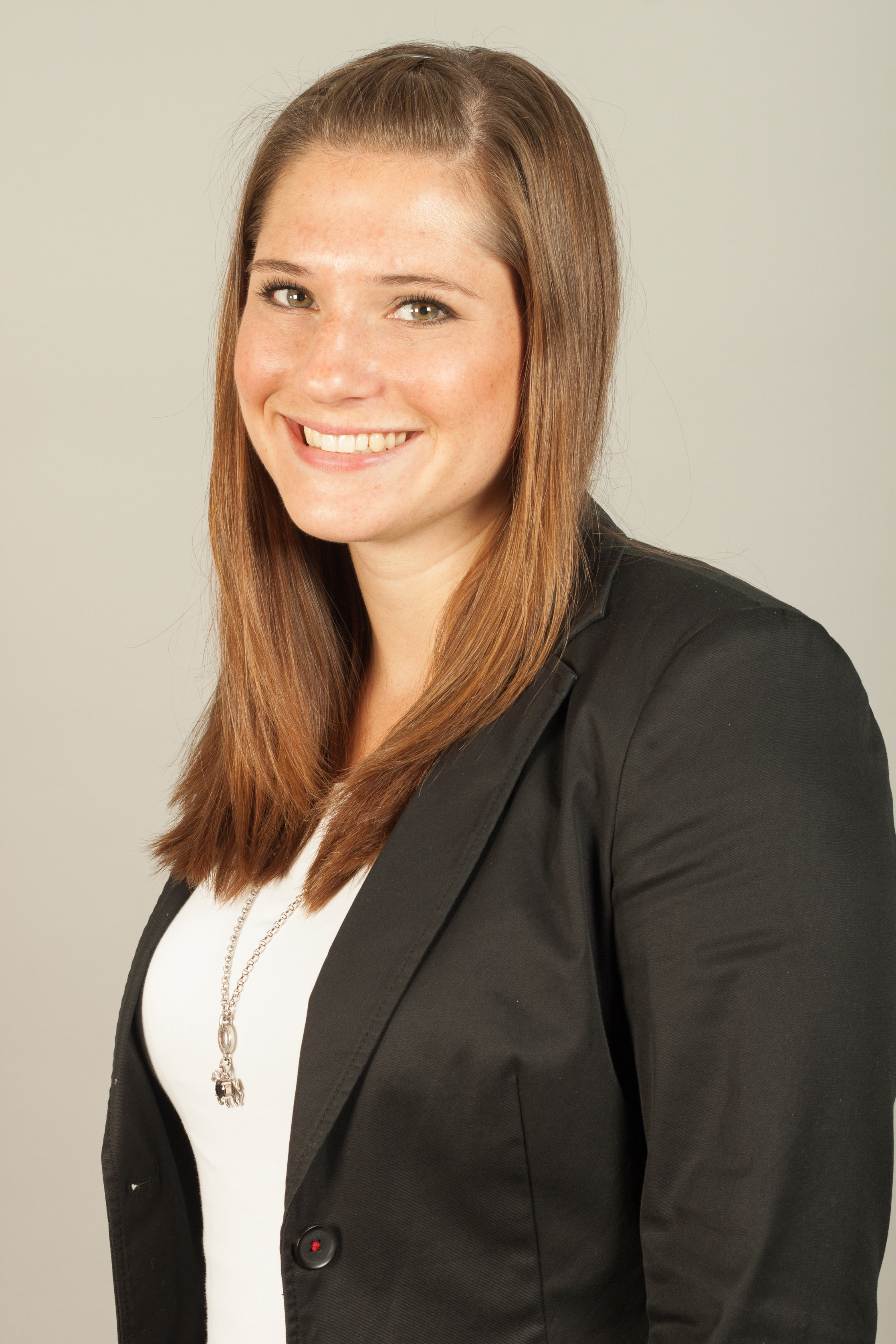 Linda Neddermann (* 5. März 1988 in Bremen) ist eine deutsche Politikerin (Bündnis 90/Die Grünen) und Mitglied der Bremischen Bürgerschaft.